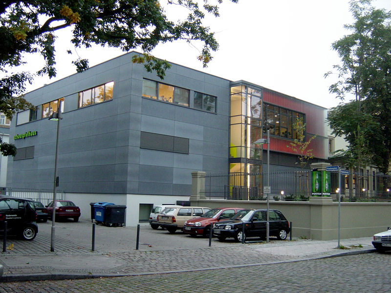 Rückseite des Schauspielhauses in Magdeburg (Neubau)